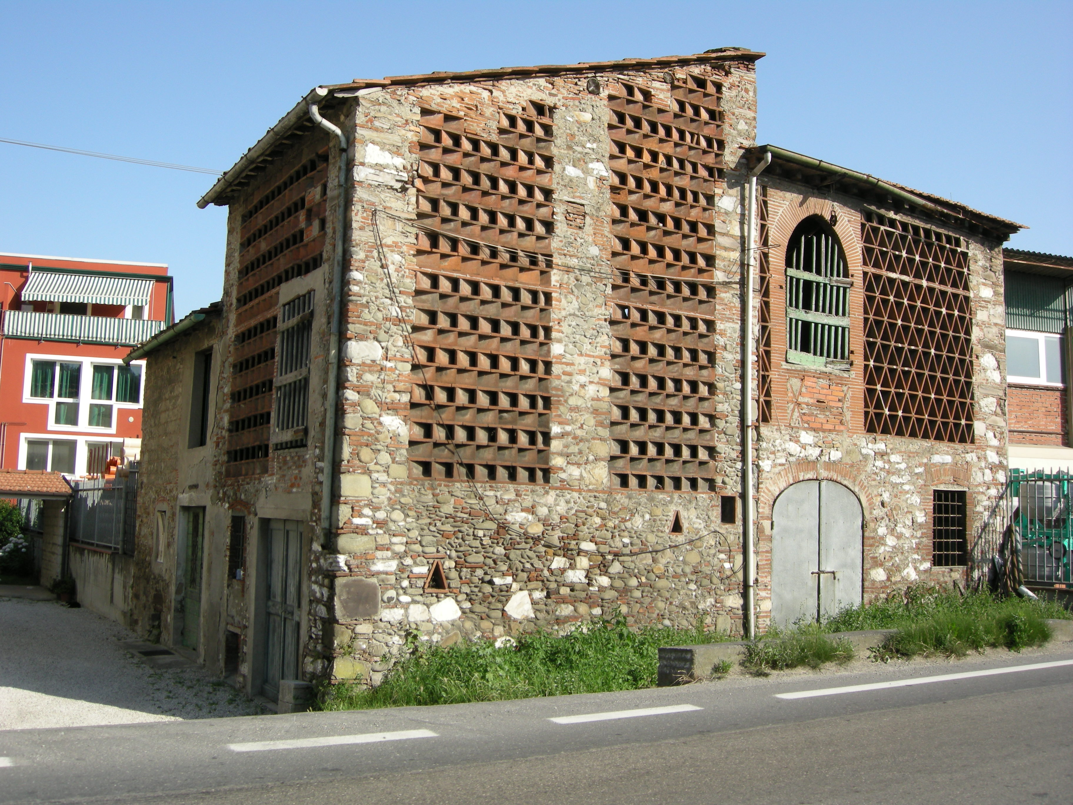 Lucca, vecchio fienile